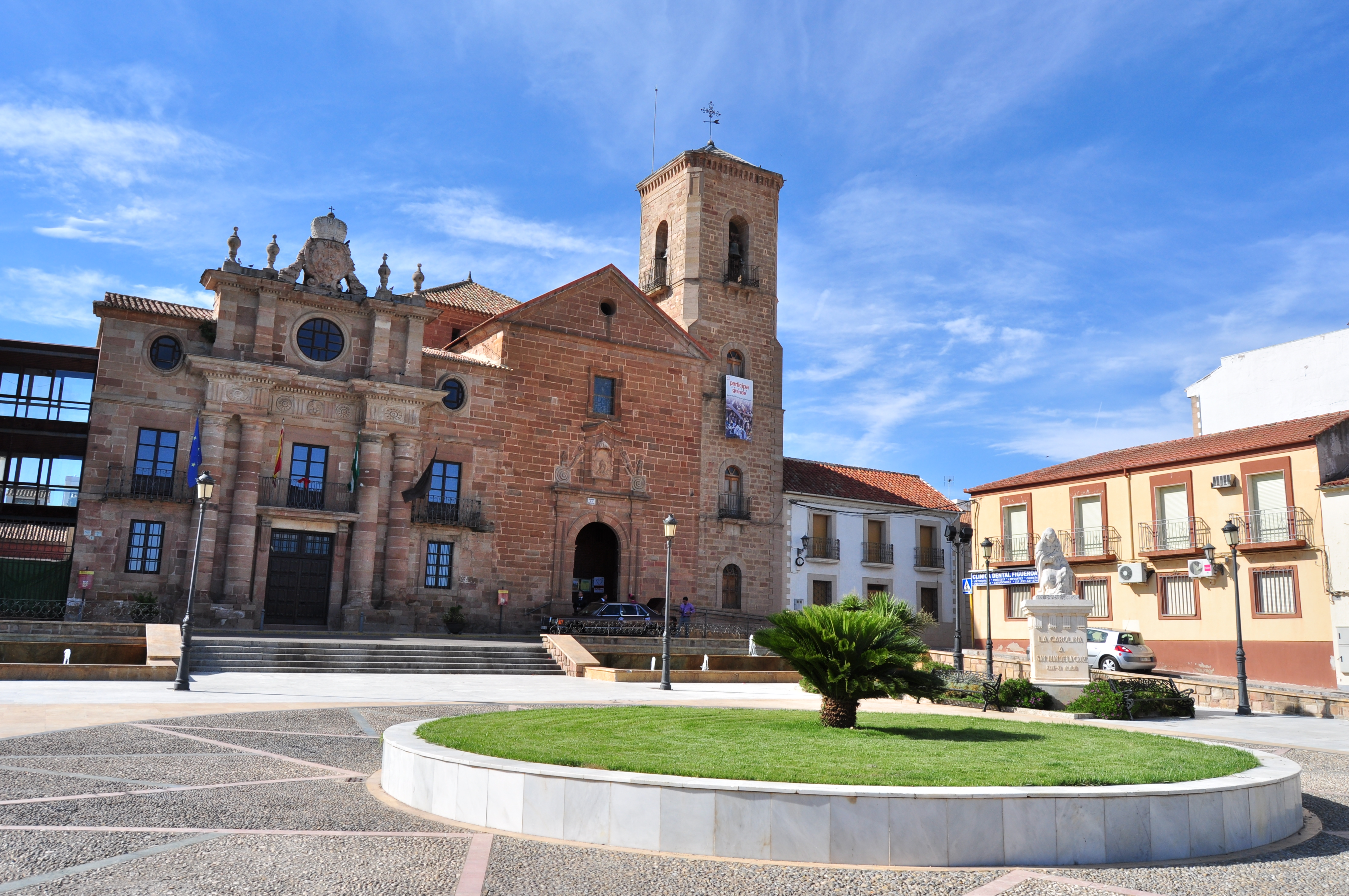 La Carolina, Spain.